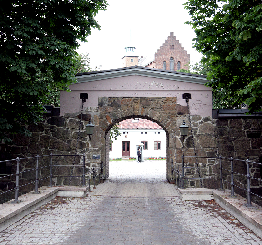 Festningsporten, Akershus. Bygd 1653. Ny vindebru 1848.